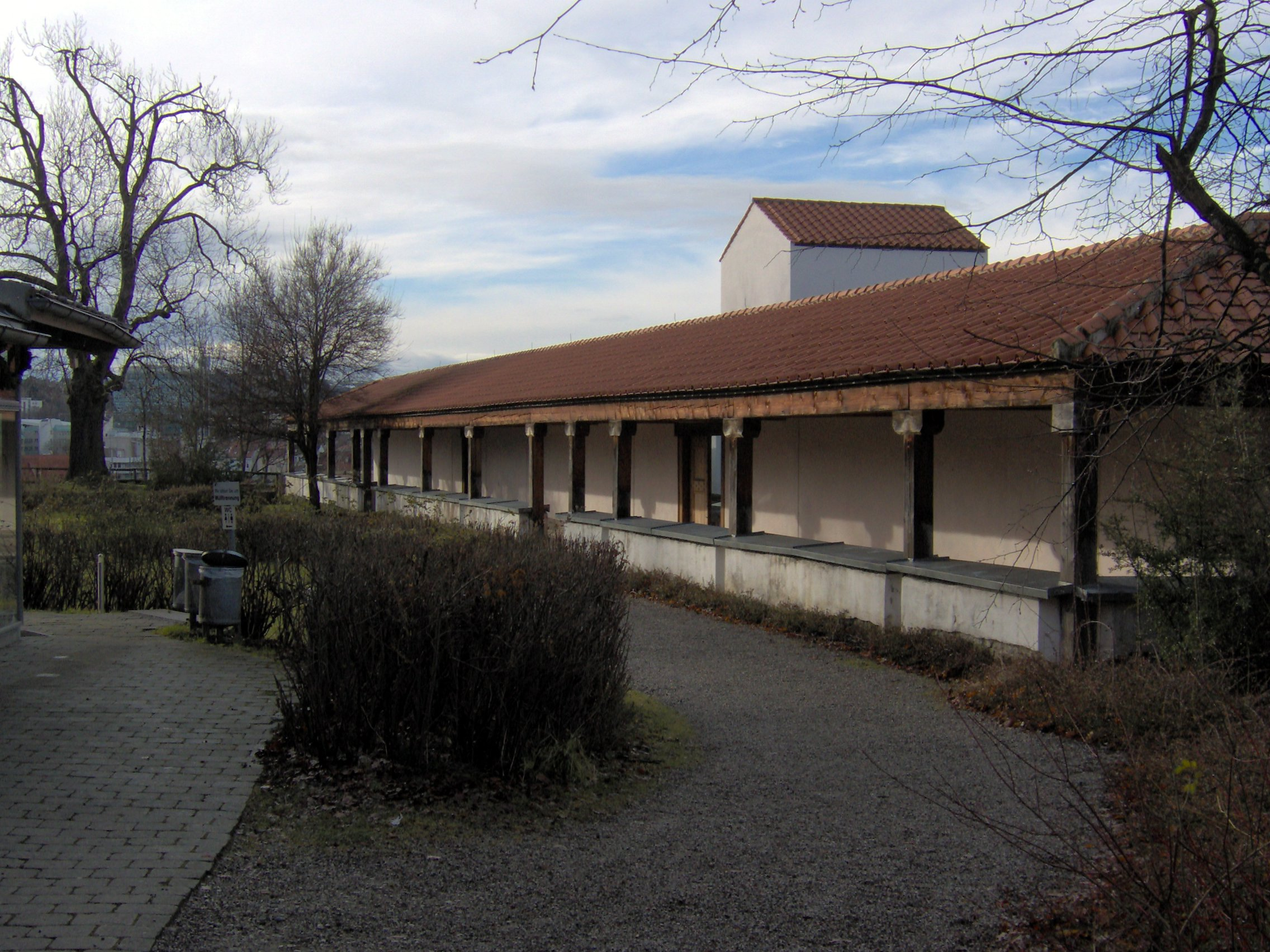 Archäologischer Park Cambodunum Kempten Tempelbezirk